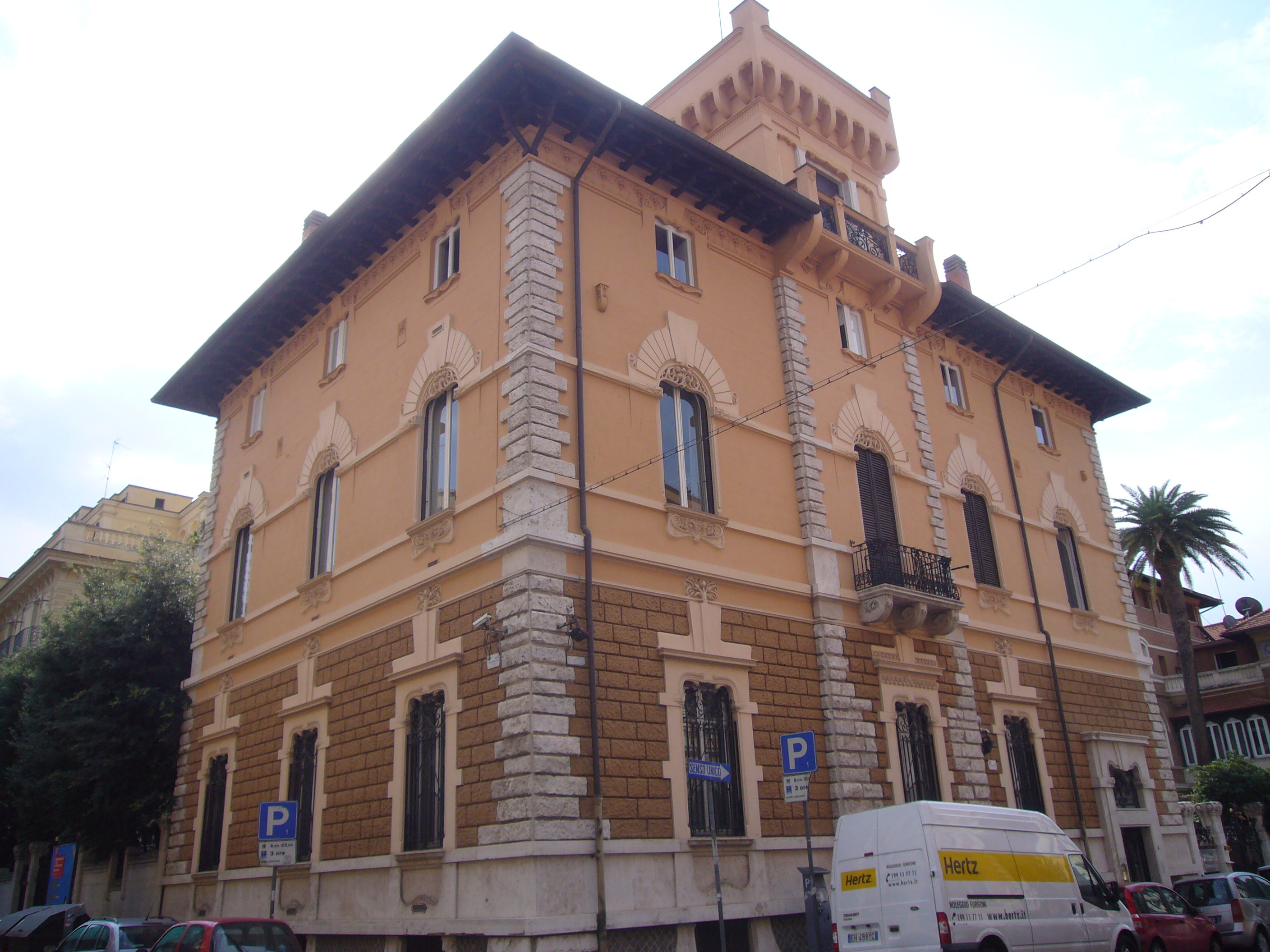 Roma, villino Florio, lato via Sardegna (progettista Ernesto Basile)